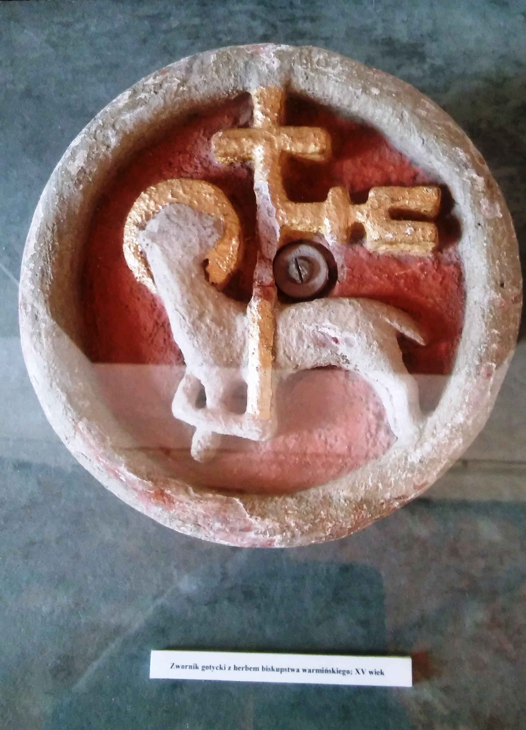 zwornik herb biskupstwa warmińskiego kościół św. Katarzyny Braniewo Lidzbark Warmiński